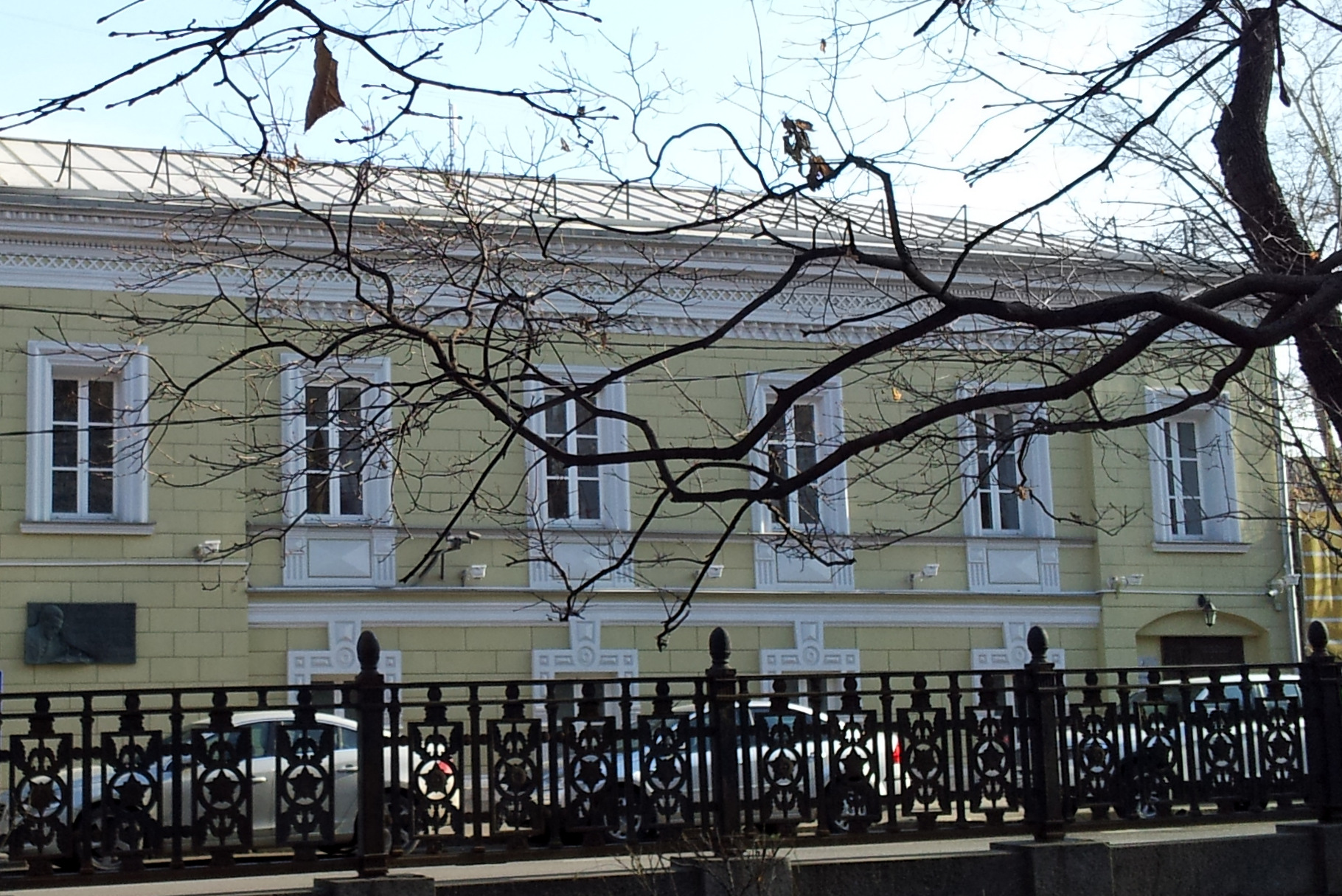 Здание музея шахмат Российской Шахматной Федерации в городе Москве на Гоголевском бульваре 14